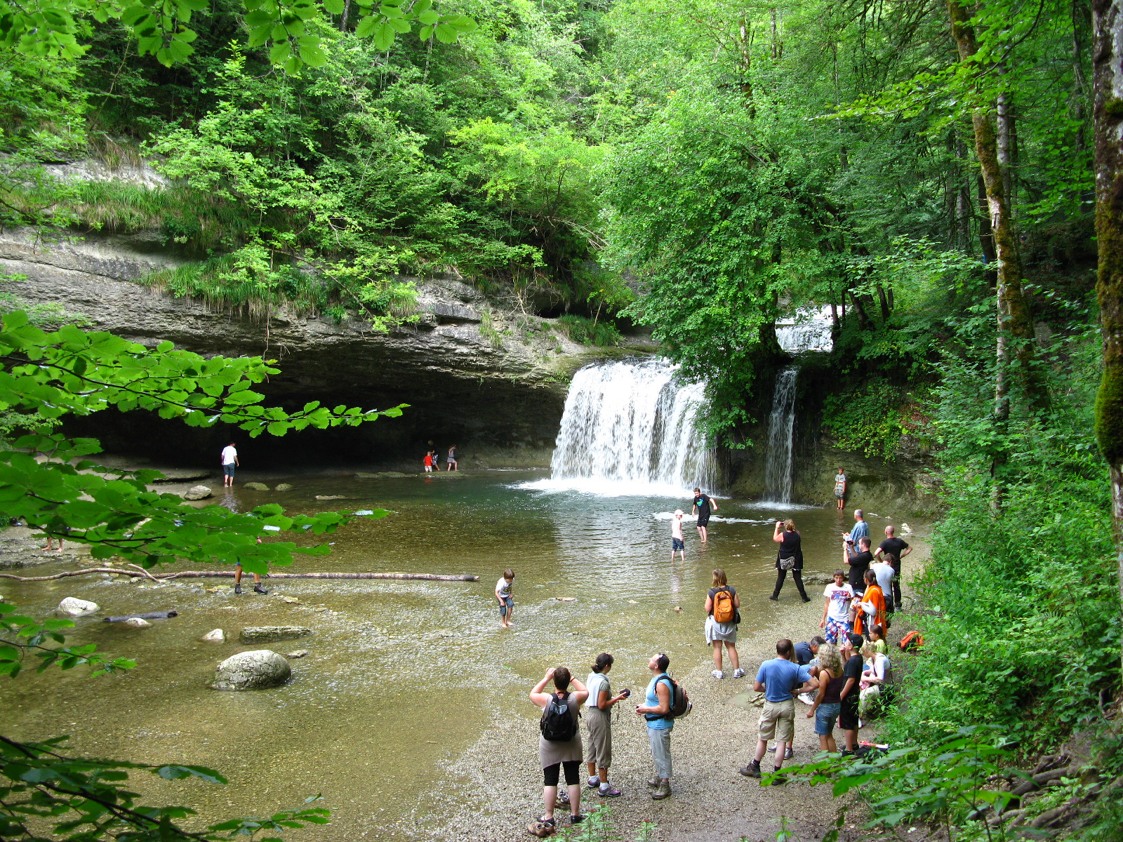 Cascades du Hérisson